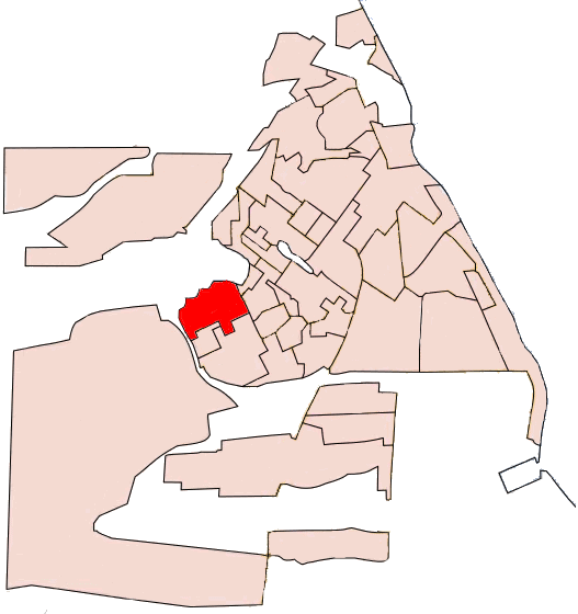 Barrio Gran Jardín